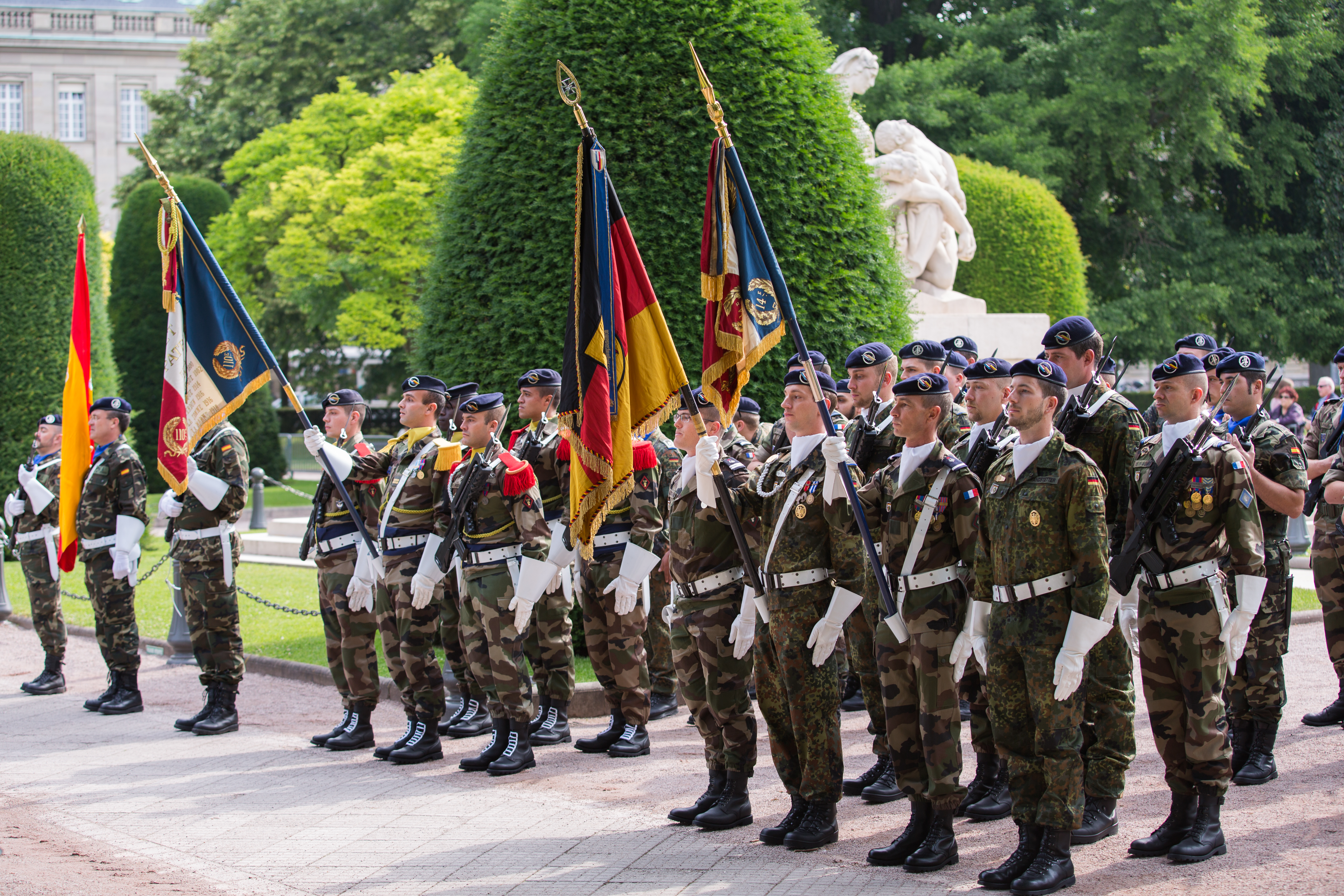 Strasbourg, 28 juin 2013, place de la République. Passage de commandement à l’Eurocorps entre les généraux Olivier de Bavinchove et Guy Buchsenschmidt.